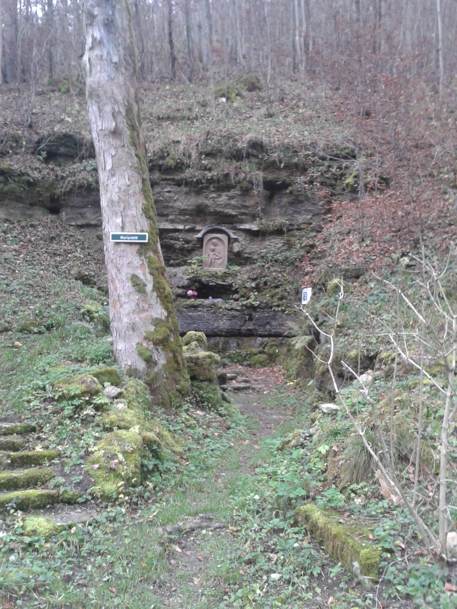 Marienbild - ehemalige Marienkapelle im Tal der Haßfurth Meiningen